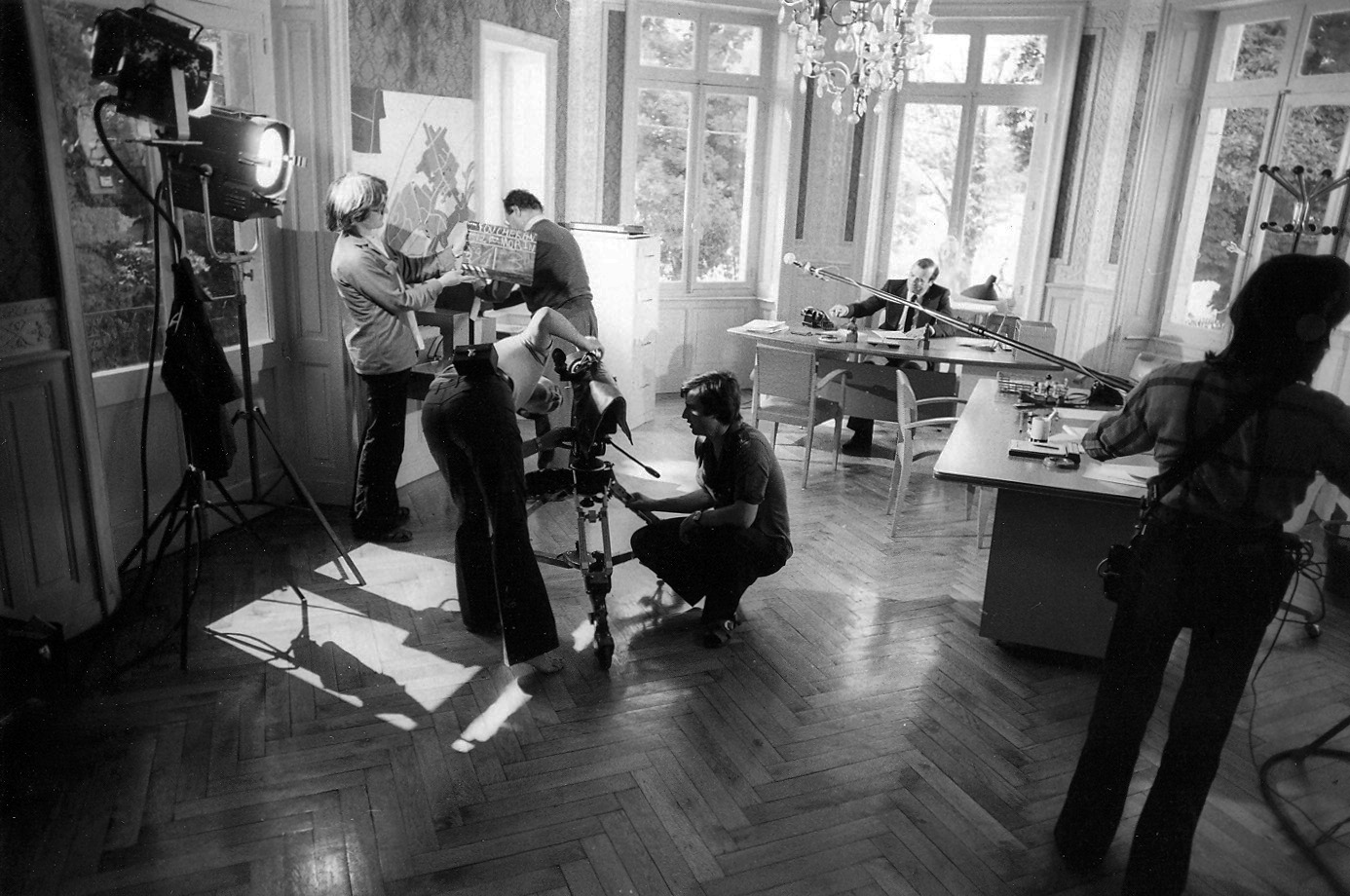 La Bêtacorne, courts-métrages de fiction (France 3 Bourgogne-Franche-Comté) réalisés en 1979 par Jean-Claude Morin à Foucherans (Jura) d'après un fait-divers réel : l'invasion du village par des centaines de milliers d'escargots. Ici, tournage dans la mairie qui doit faire face à l'invasion.